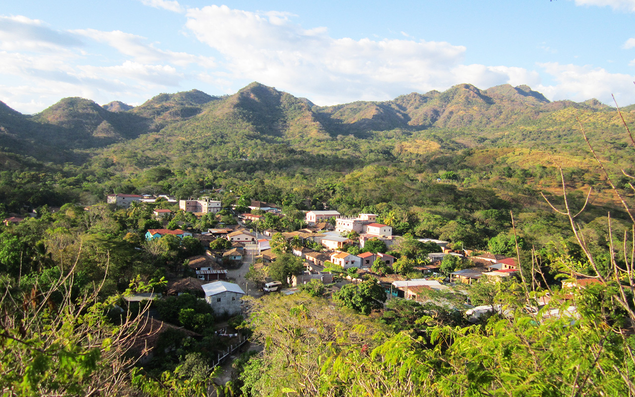 Panoramica de Magdalena, Intibucá